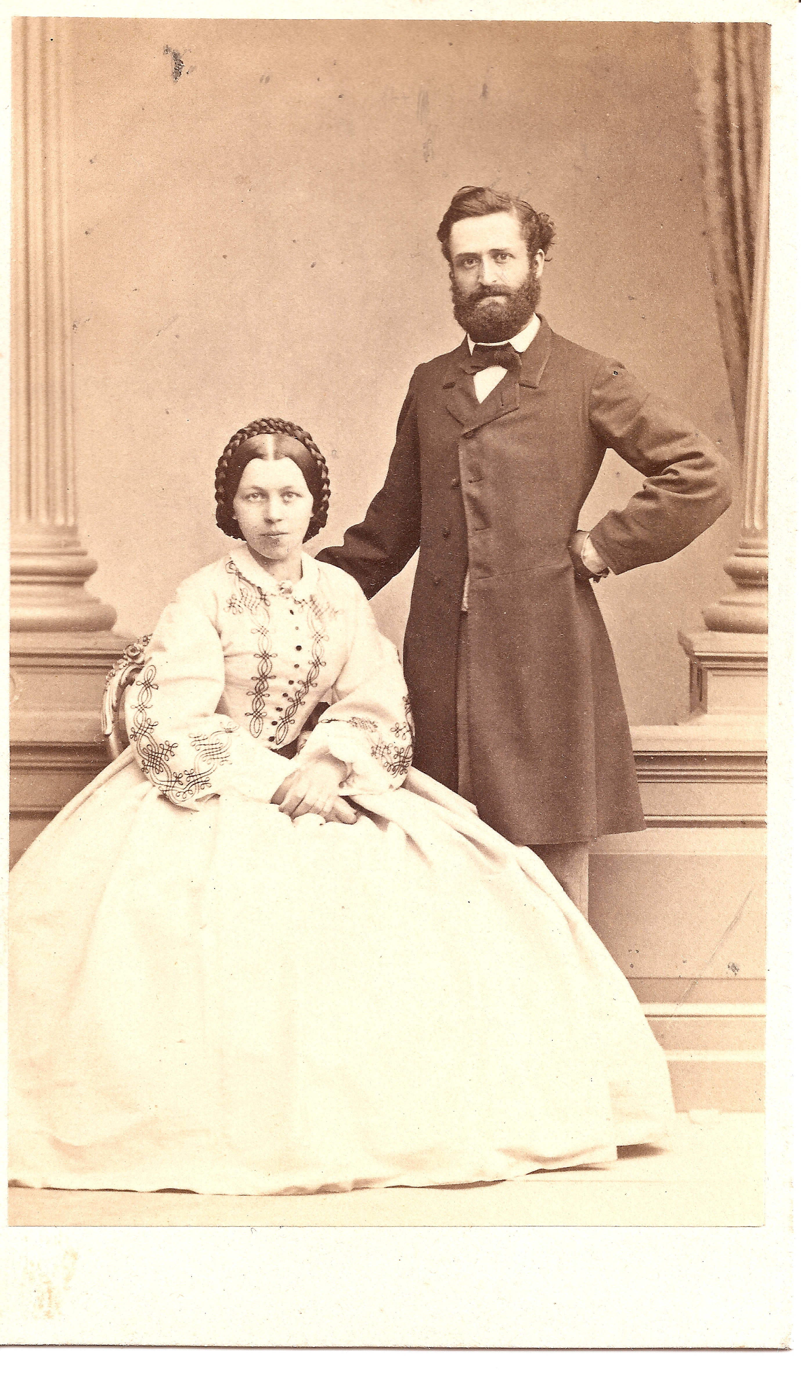 Herrmann Mährlen Gutspächter auf dem Elfinger Hof ∞ Marie Stark, Tochter von Karl Stark (Psychiater), auf einer Fotografie auf Albuminpapier um 1862